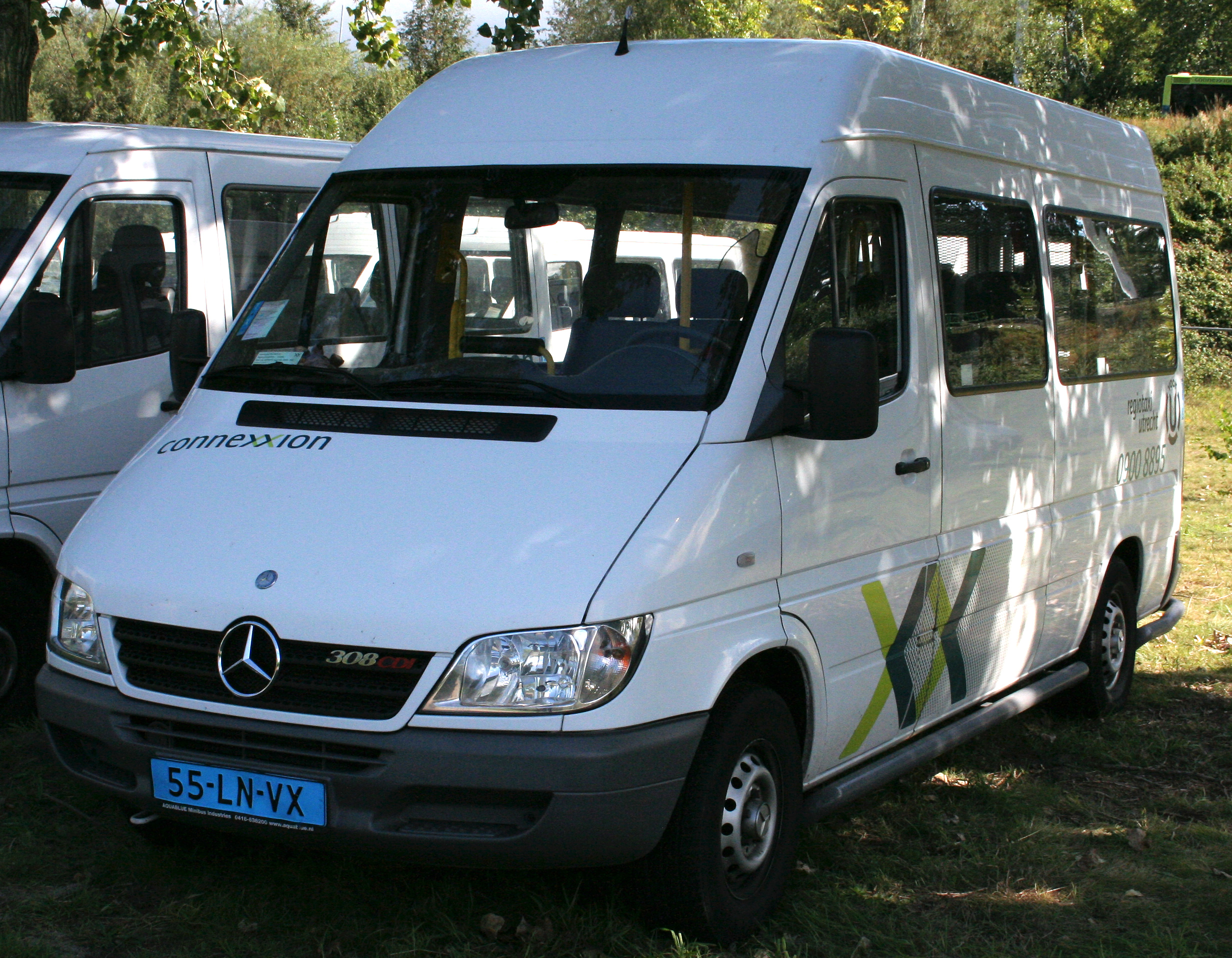 Connexxion Taxi